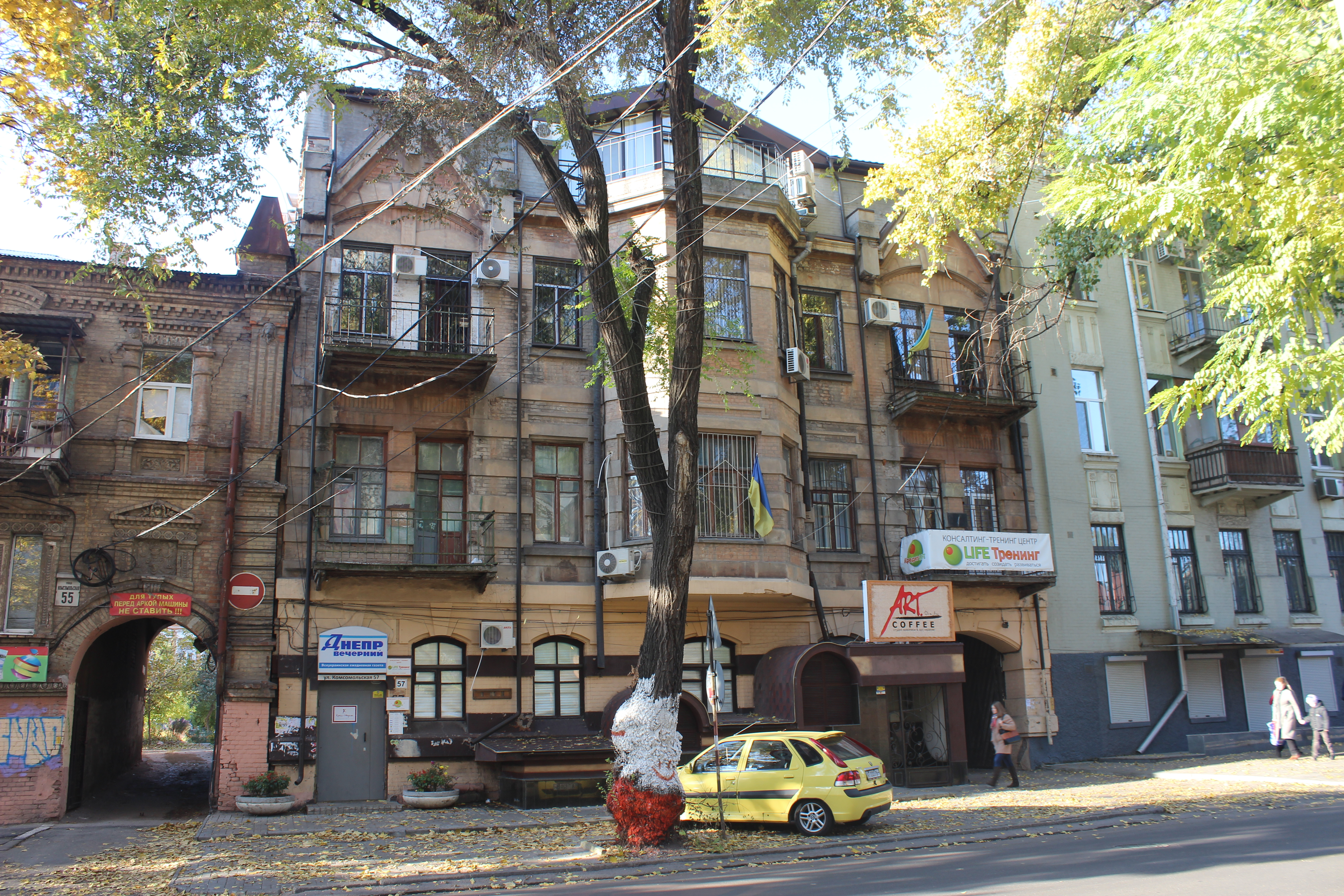 Доходний будинок, Дніпро, вул. Старокозацька, 57